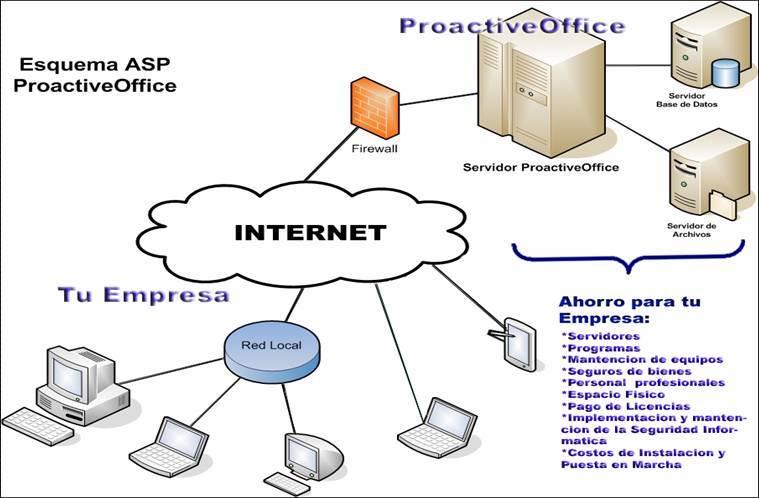 Modelo ASP desarrollado por Intellisoft Intellicomppara su producto ProactiveOffice, en el que se aprecia que el usuario no necesita invertir en hardware adicional. Esta tecnológica nos permite entregar al Cliente un servicio remoto sustentado en el sistema que implica la provisión de un servicio de aplicaciones en Web, para el manejo integral del sistema ofrecido, esto facilita el uso, bajando los costos de puesta en marcha, ya que el cliente no necesita servidores, equipos nuevos, ni memorias adicionales, sólo requiere de la conexión a Internet y la aplicación de una capacitación básica simple presencial o remota.